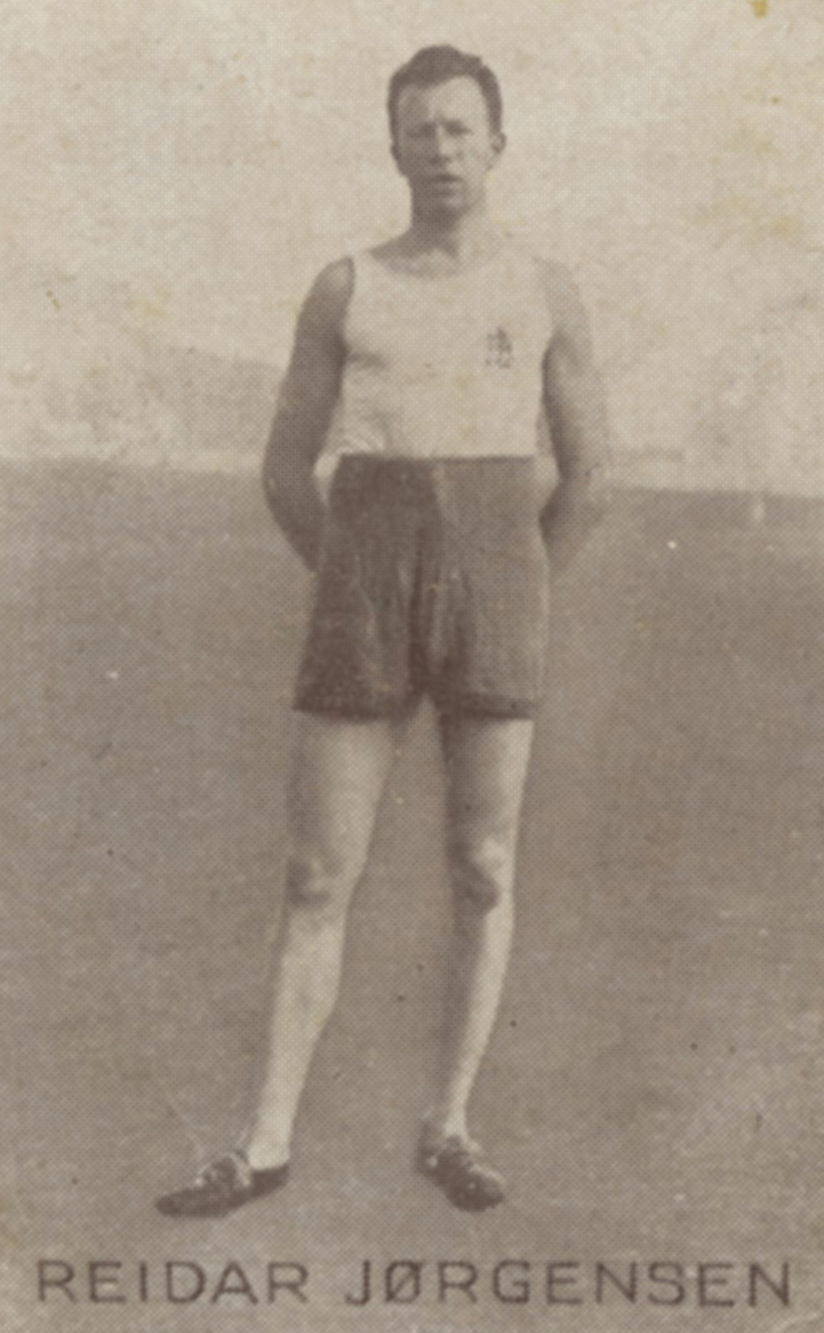 Format: Samlekort Dato / Date: ca. 1930 (dokumentet) Fotograf / Photographer: Ukjent Wikipedia: Reidar Jørgensen (1904 - 1985) Eier / Owner Institution: Trondheim byarkiv, The Municipal Archives of Trondheim Arkivreferanse / Archive reference: Sportsklubben Freidig: Sigarettfoto ca. 1930 (Løpenr. 75) F23967 Wikipedia: [xxx xxx] Tekst på baksiden: Reidar Jørgensen, Norges dygtige og fremragende mellemdistanceløper. Er mester paa 800 og 1500 m. løp og har ogsaa naad udmerkede resultater paa 3000 og 5000 m. Reidar Jørgensen som er Lillehammers "stolthet" er ogsaa en udmerket skiløper. Merknad: Disse samlekortene med bilder av norske og internasjonale idretthelter fulgte med i sigarettpakker på 1920 og 30-tallet - derav tobakksreklamen på baksiden. Samlekortene kommer fra Sportsklubben Freidigs arkiv, og inneholder nærmere 90 unike kort pent plassert i et samlealbum. Samleren var den senere skipsmegler Finn Følling (1914 – 1985).